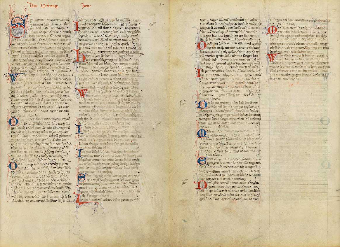 Codex Manesse, UB Heidelberg, Cod. Pal. germ. 848, fol. 230r und 230v, Der Düring